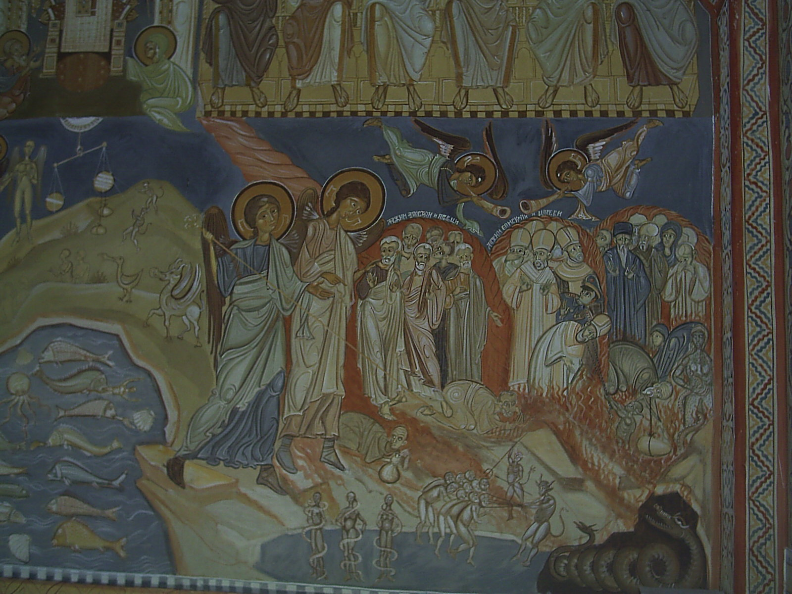 И. Броз Тито в аду. Фреска в монастыре Подмаине, 2000 г.